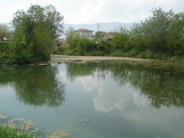 Άποψη της λίμνης του Κεφαλοβρύσου.